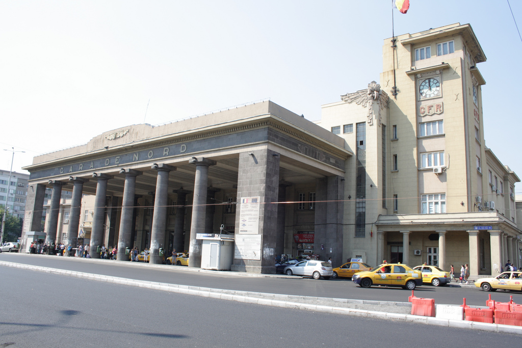 Gara de Nord - Bucuresti vedere coloane